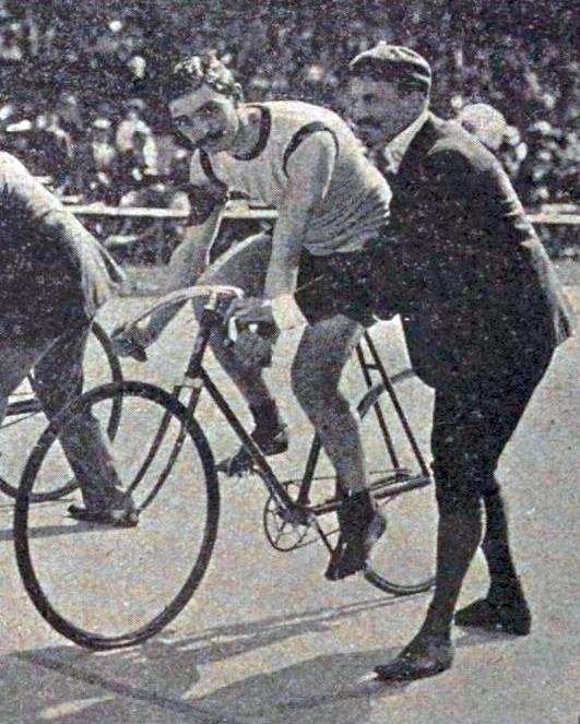 Fernand Sanz, deuxième du Grand Prix de Paris amateurs en 1902 (et vice-champion olympique de sprint en 1900).)